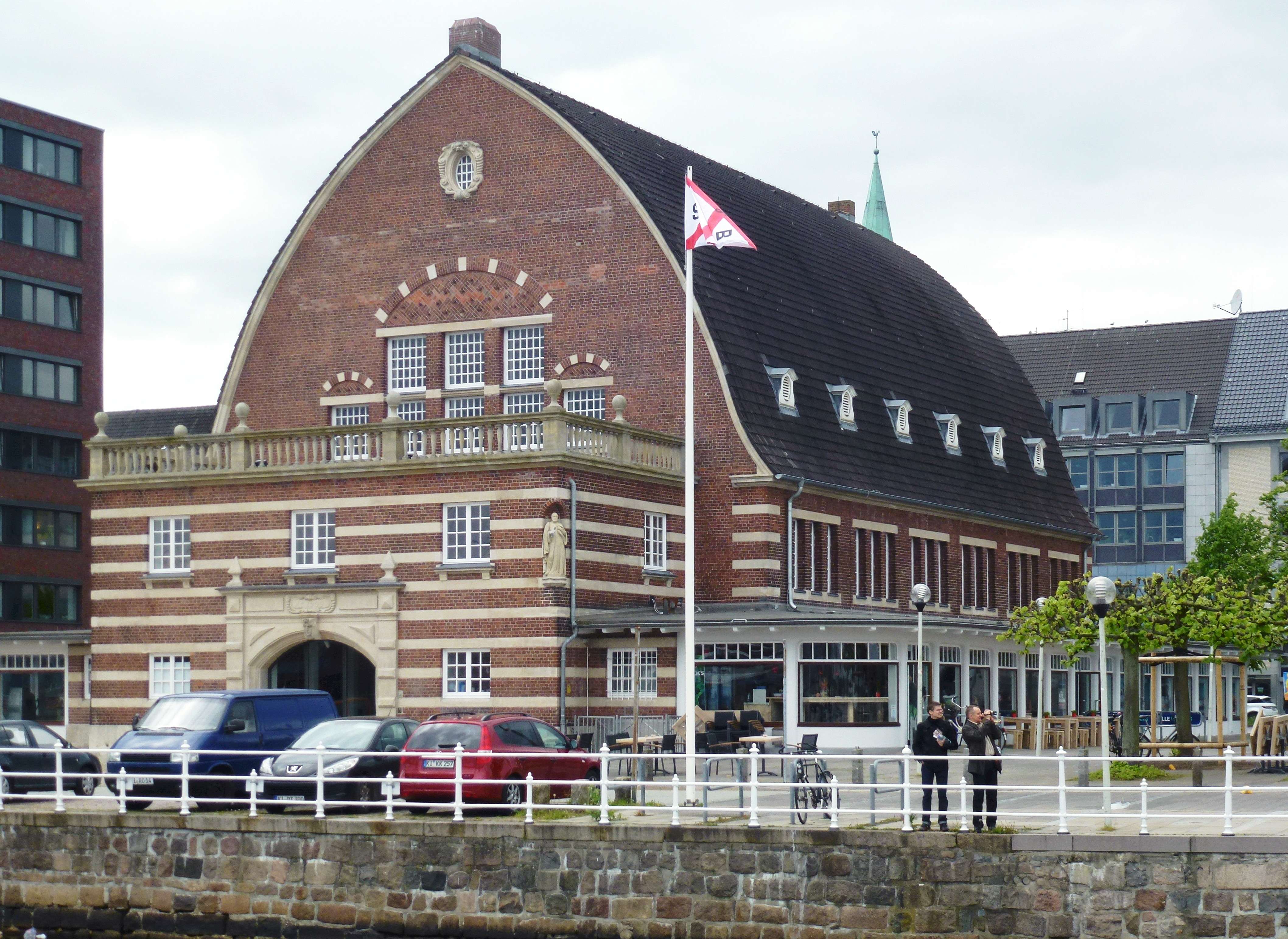 Schifffahrtsmuseum Kiel (alte Fischmarkthalle)